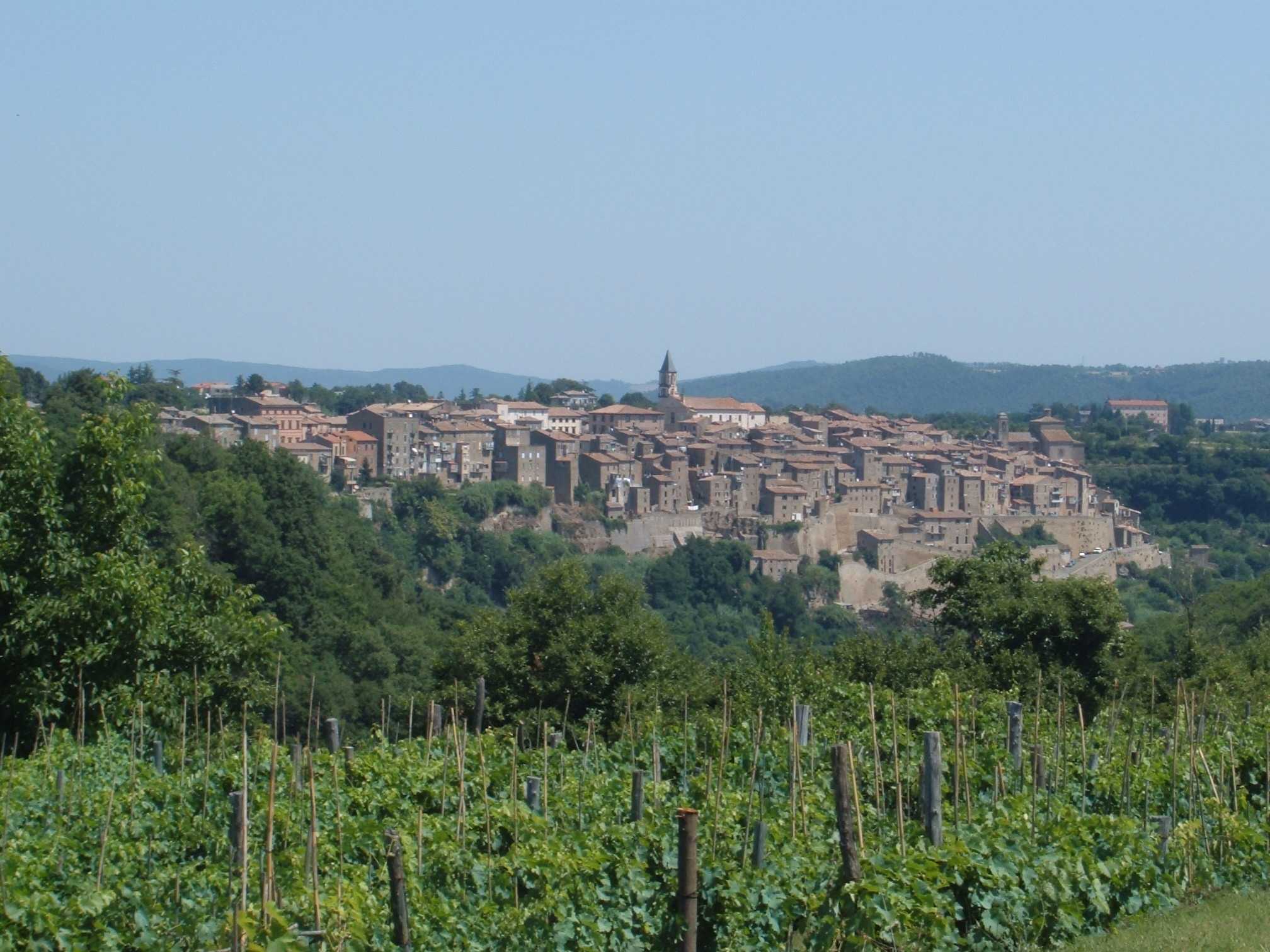 Panorama di Grotte di Castro (Viterbo)0